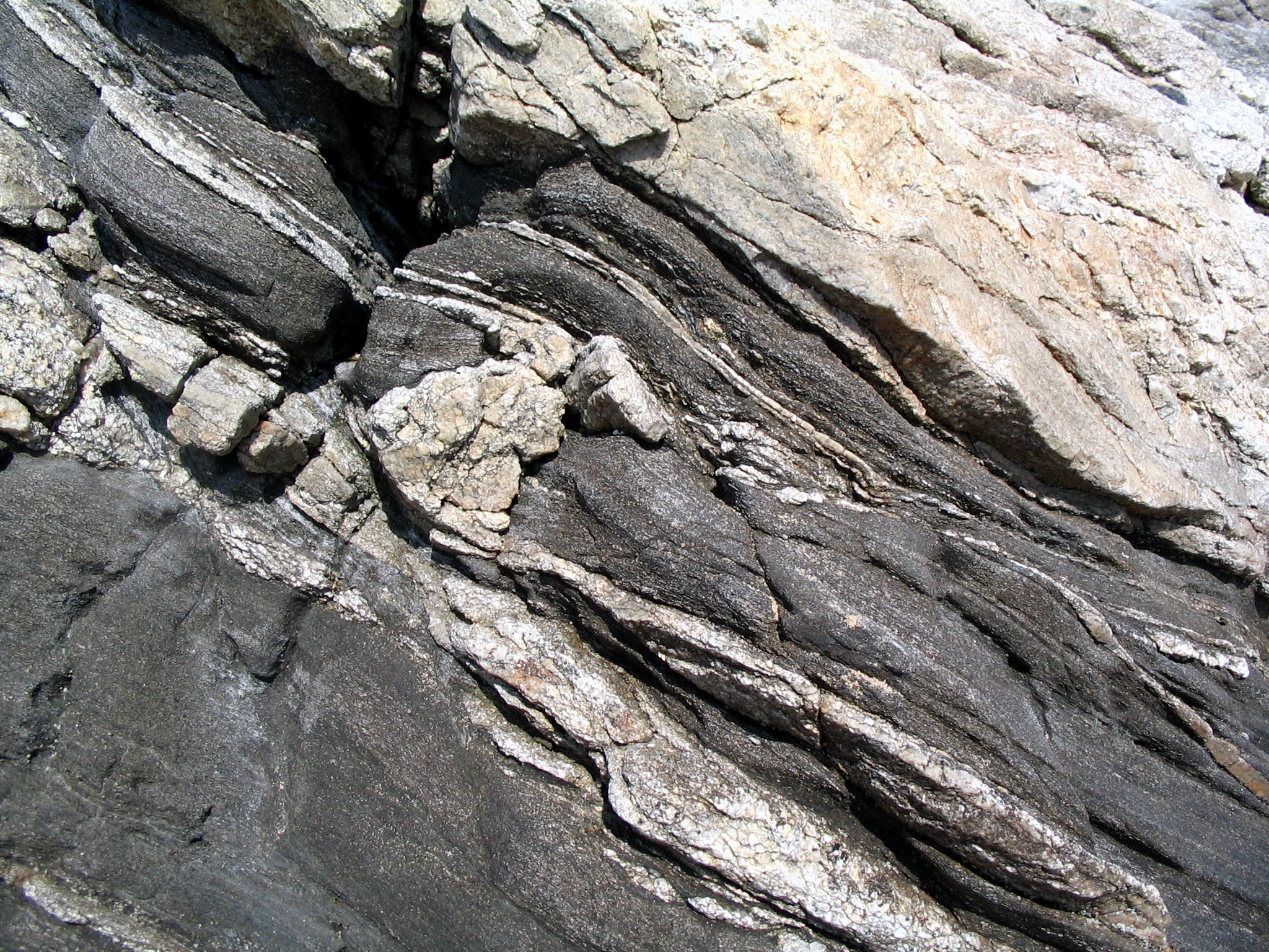 filon de pegmatite dans un micaschiste - Noirmoutier